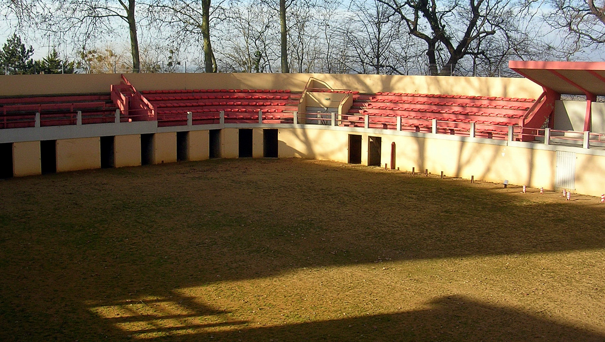 Arènes de Montaut, dans le département français des Landes